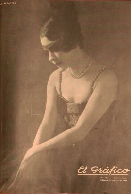 Fotografia de la ballarina la Satanela, nom artístic d'Elvira Pujol.